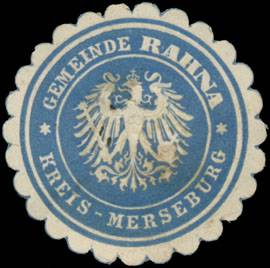 Sealing stamp Title: Gemeinde Rahna Kreis Merseburg Description: blau, weiß, geprägt Place: Rahna size: 4 cm